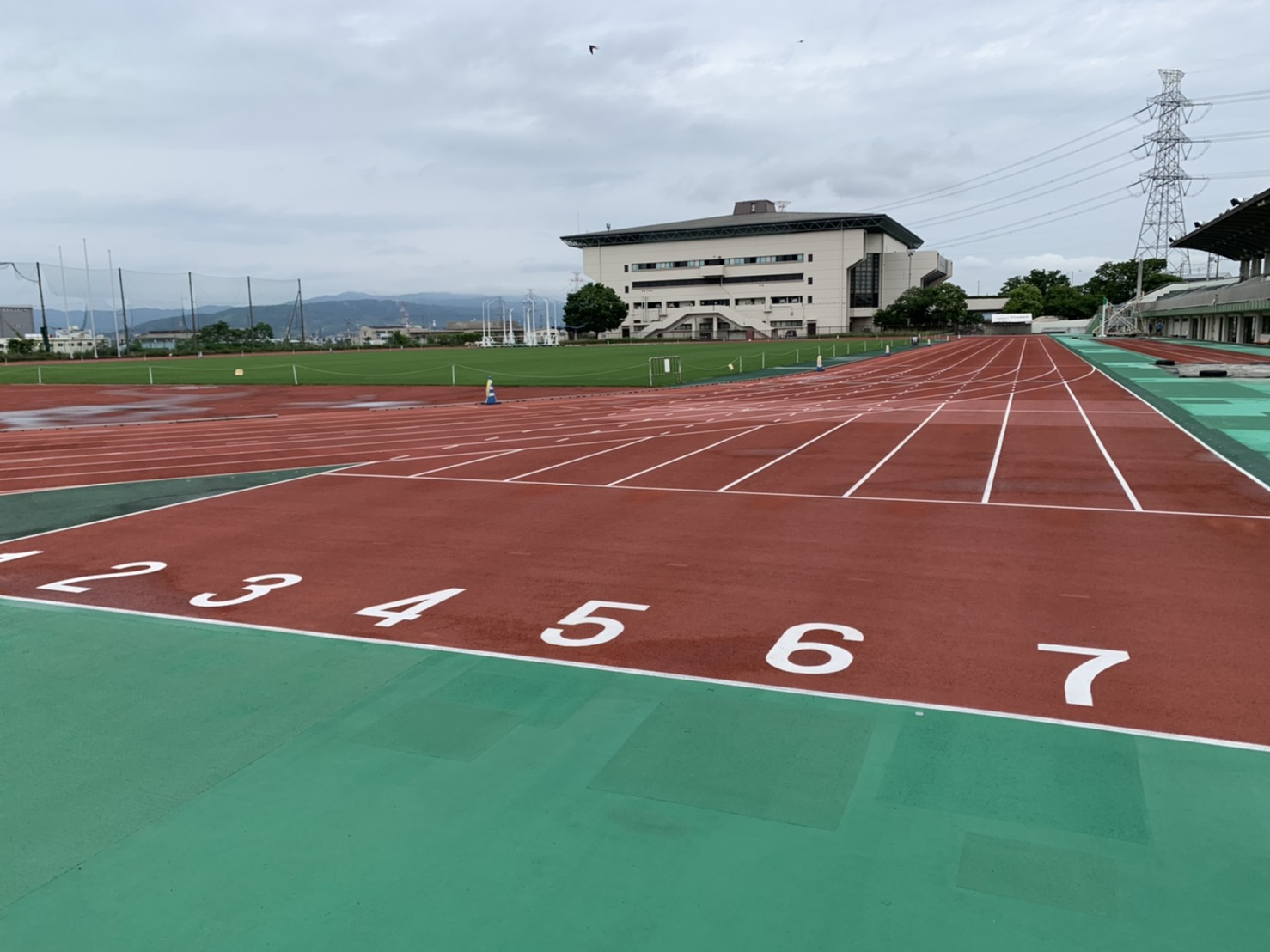 100ｍのスタート地点